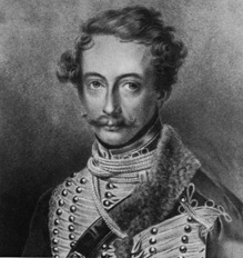 Freiherr Engelbert von Landsberg-Velen zu Steinfurt, first president of the Westfälischer Reiterverein 1835-1878